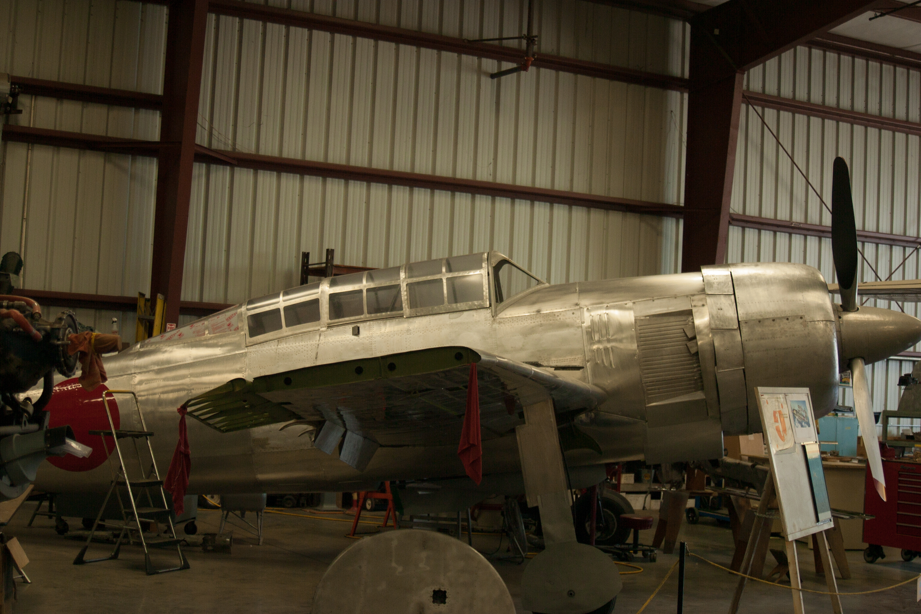 Yokosuka Suiseu D4Y4 Model 43